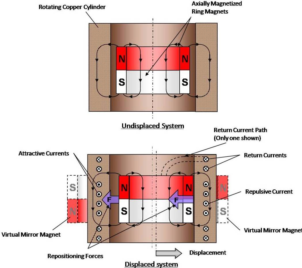 Magnetisk spegeleffekt